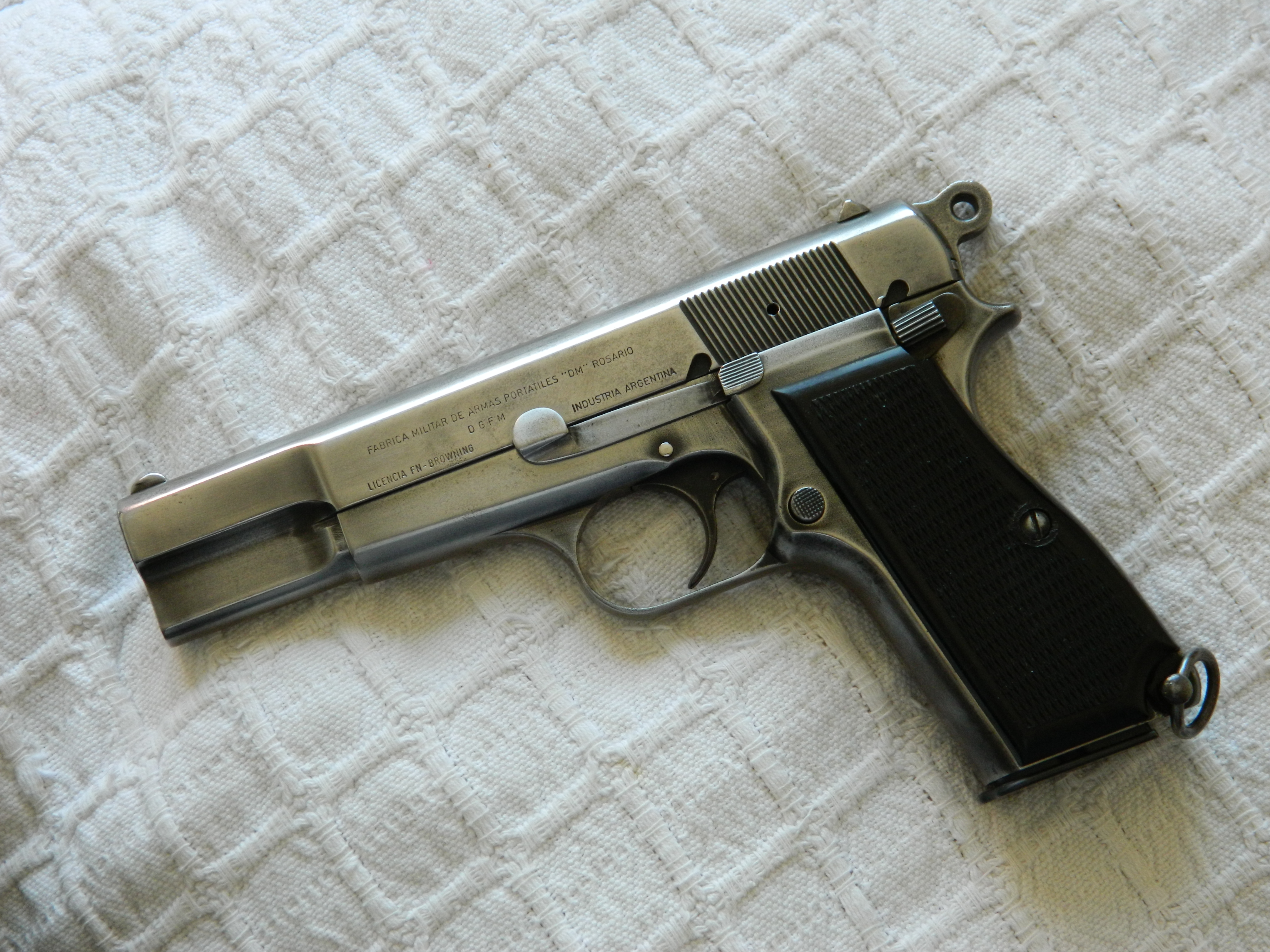 Una desgastada Browning Hi-Power, fabricada en Argentina a mediados de los '70.